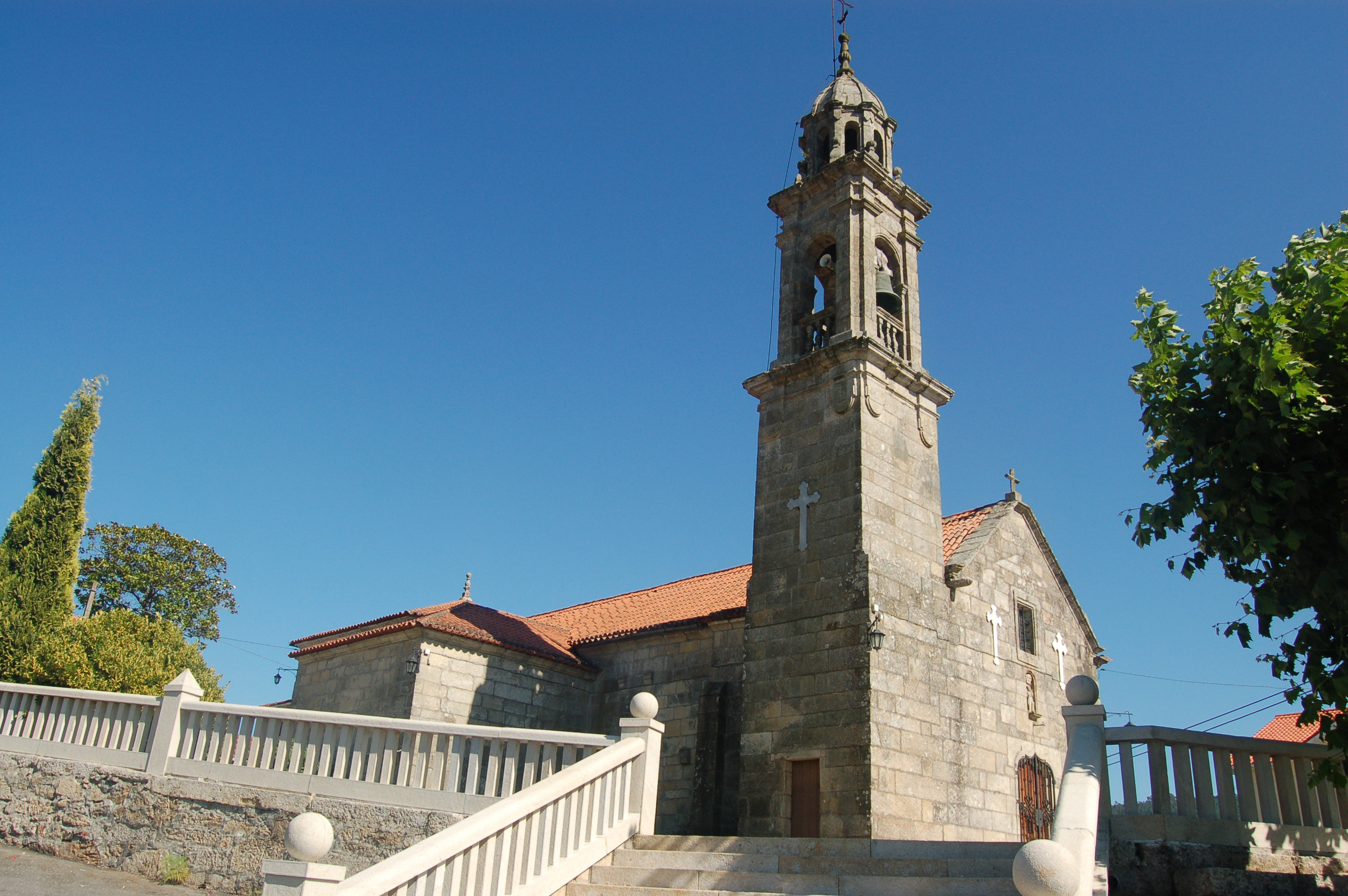 Igrexa parroquial de Dimo (Catoira)